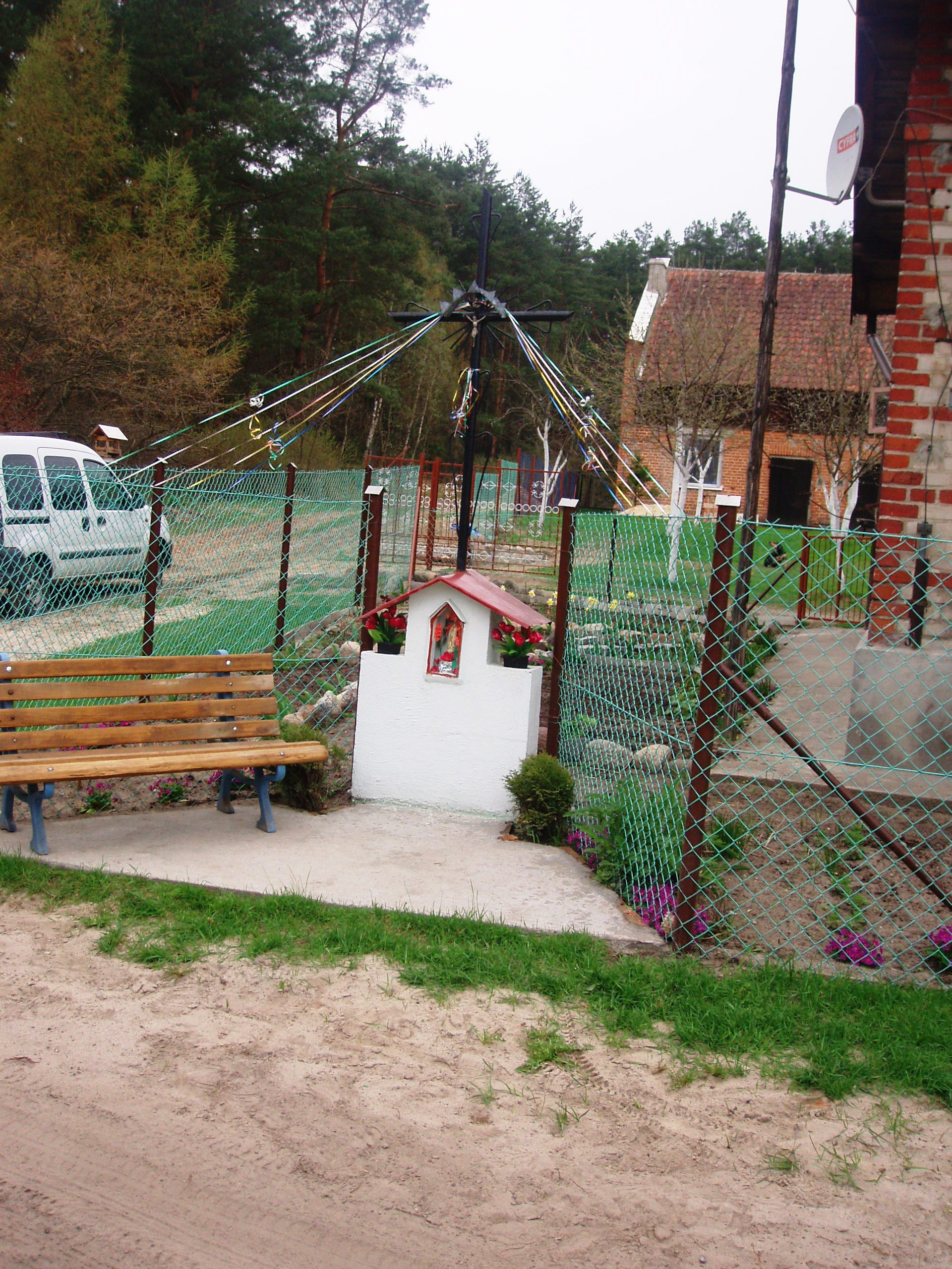 Kapliczka w Bałdzkim Piecu k. Łajsu